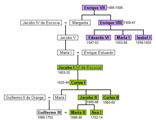 Árbol genealógico de los reyes de Inglaterra de las casas Tudor y Estuardo